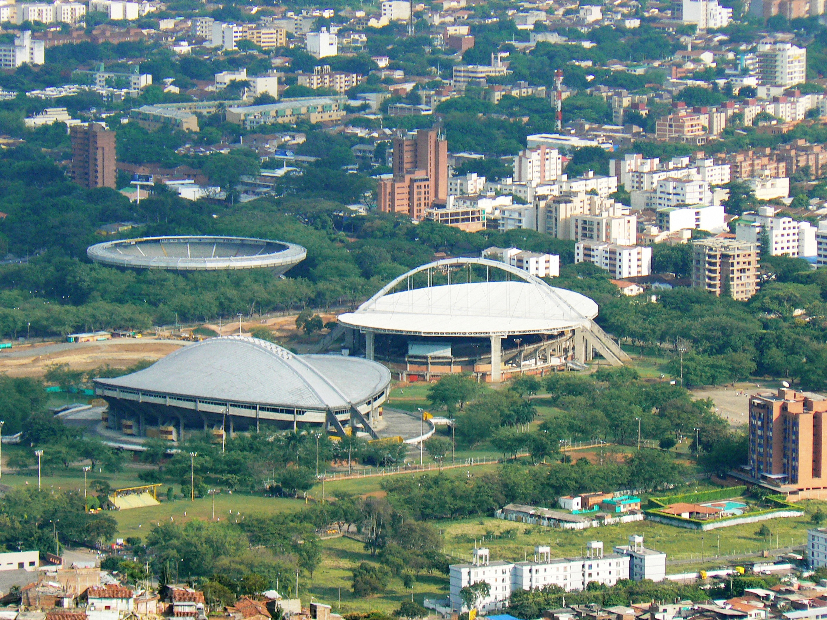 Vista panorámica de Cali desde Cristo Rey; Plaza de Toros, Velódromo y Gimnasio del Pueblo